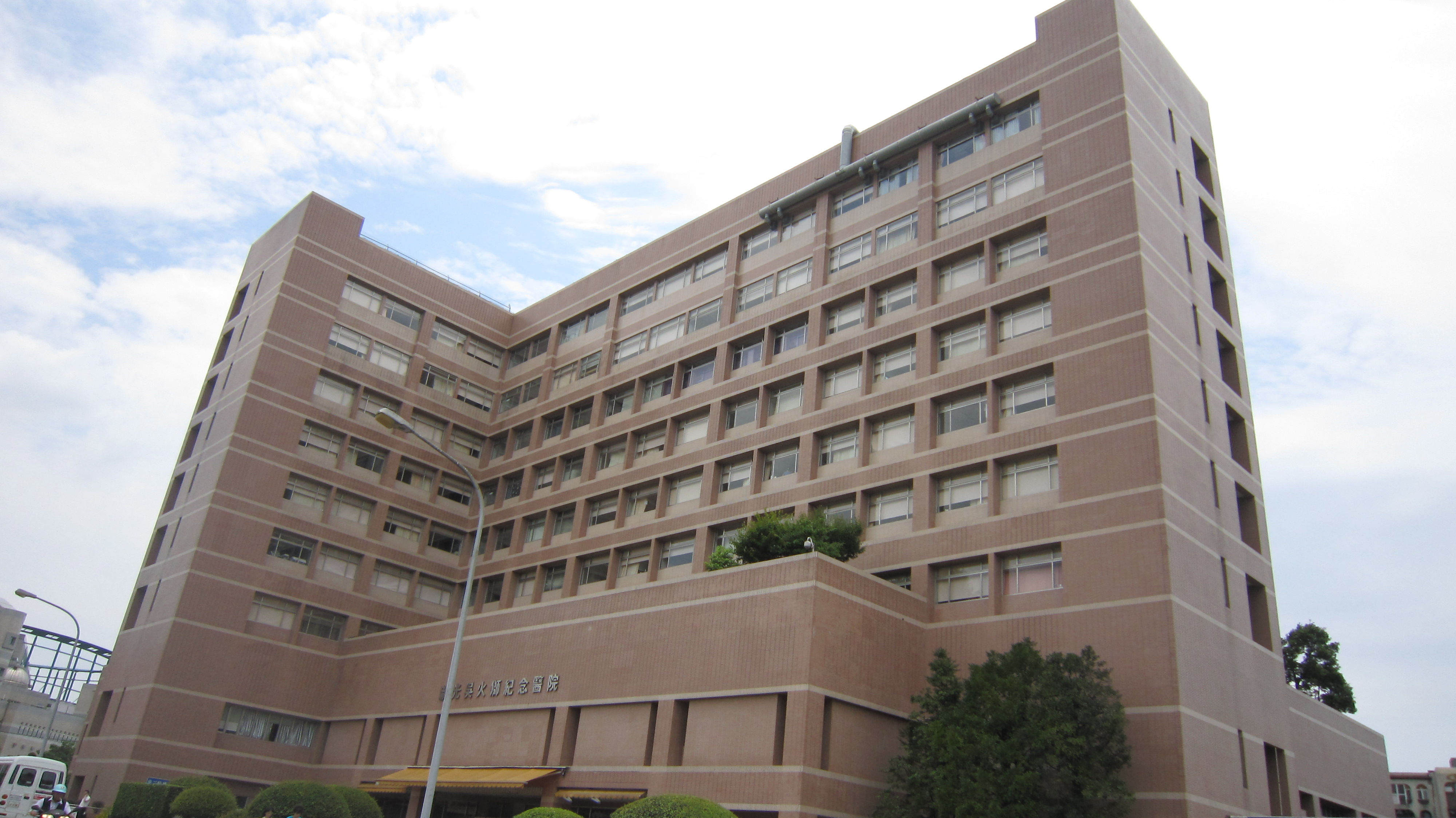 士林區新光醫院 Shin Kong Hospital in Shihlin District